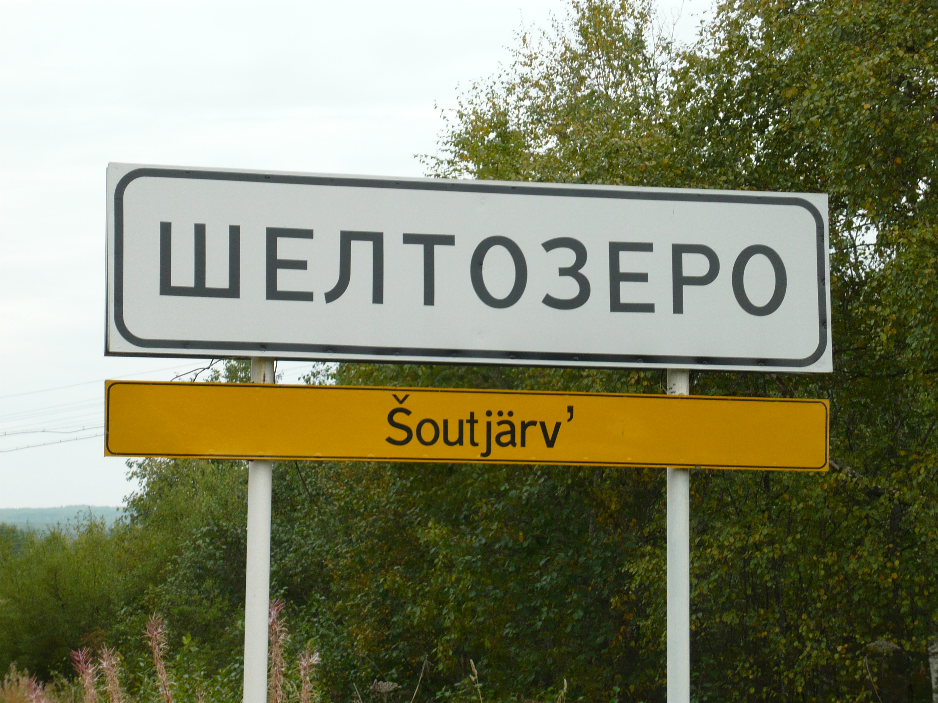 Bilingual road sign in Shyoltozero (Russian: Шёлтозеро, Veps: Šoutjärv`)